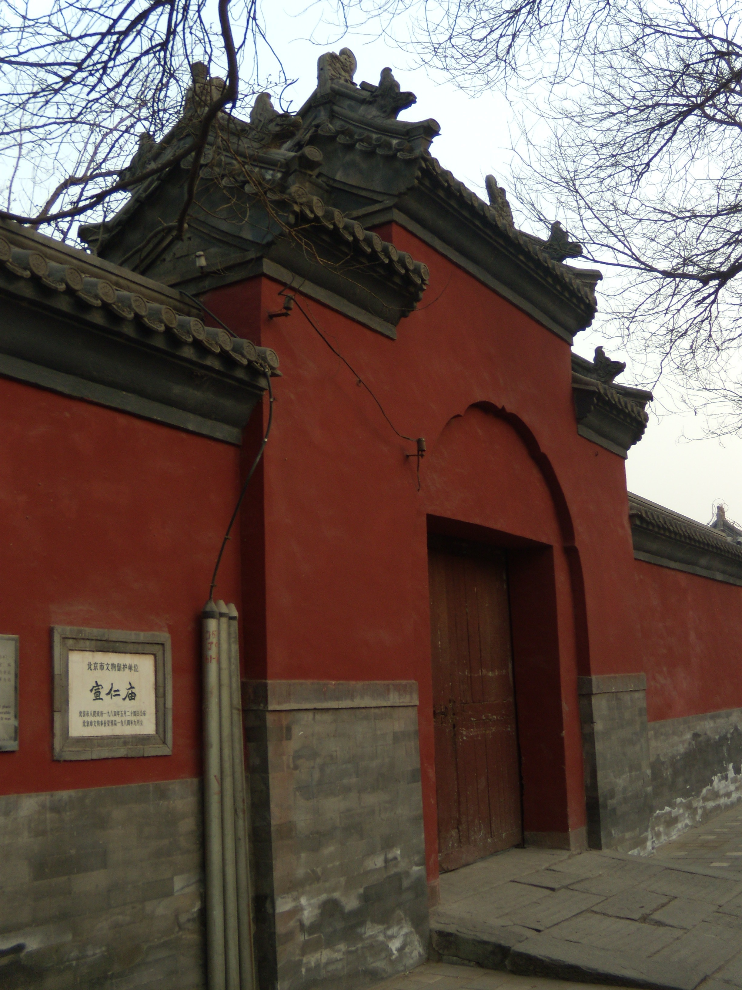 宣仁庙